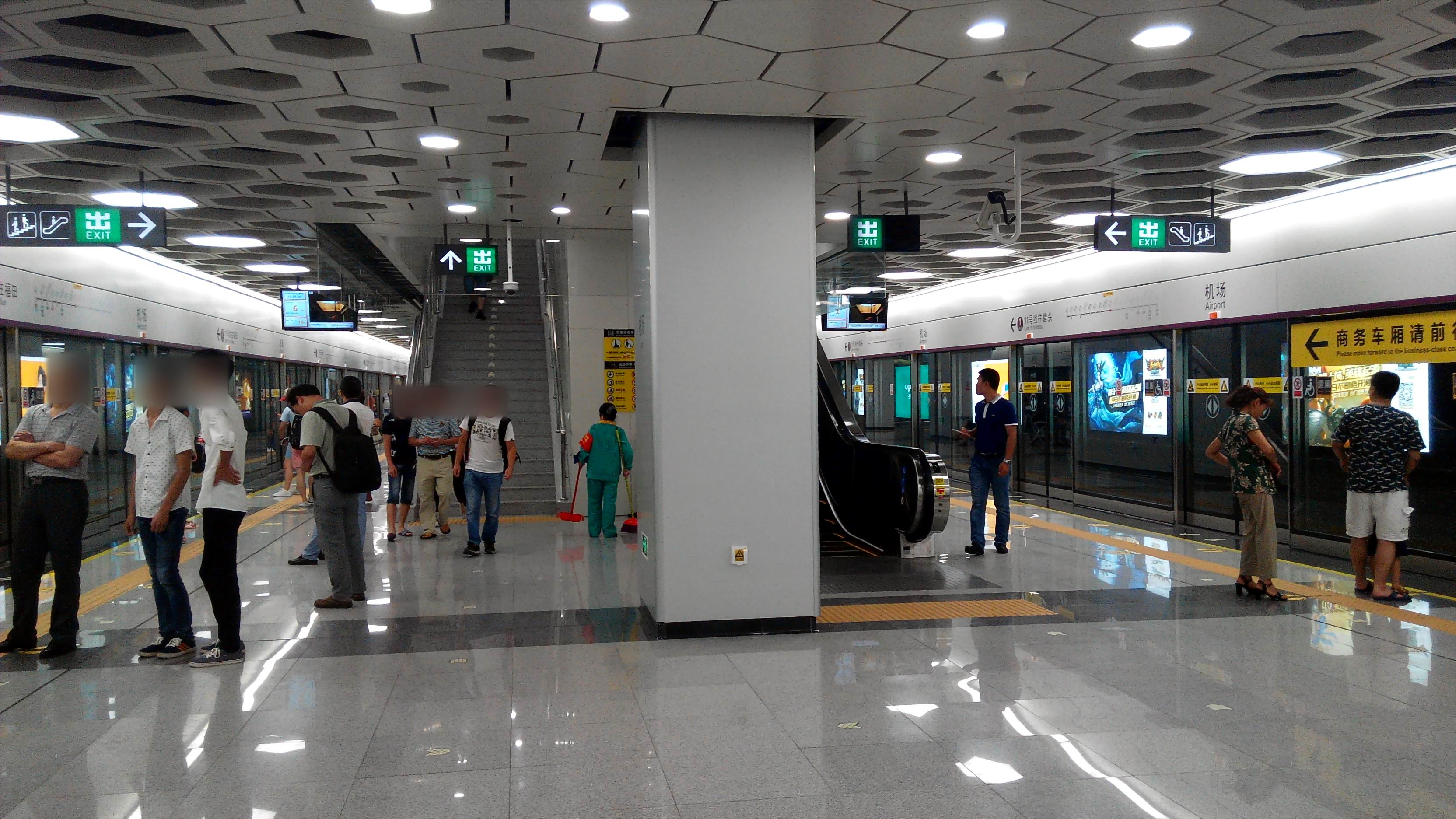 深圳地铁11号线 机场站 站台